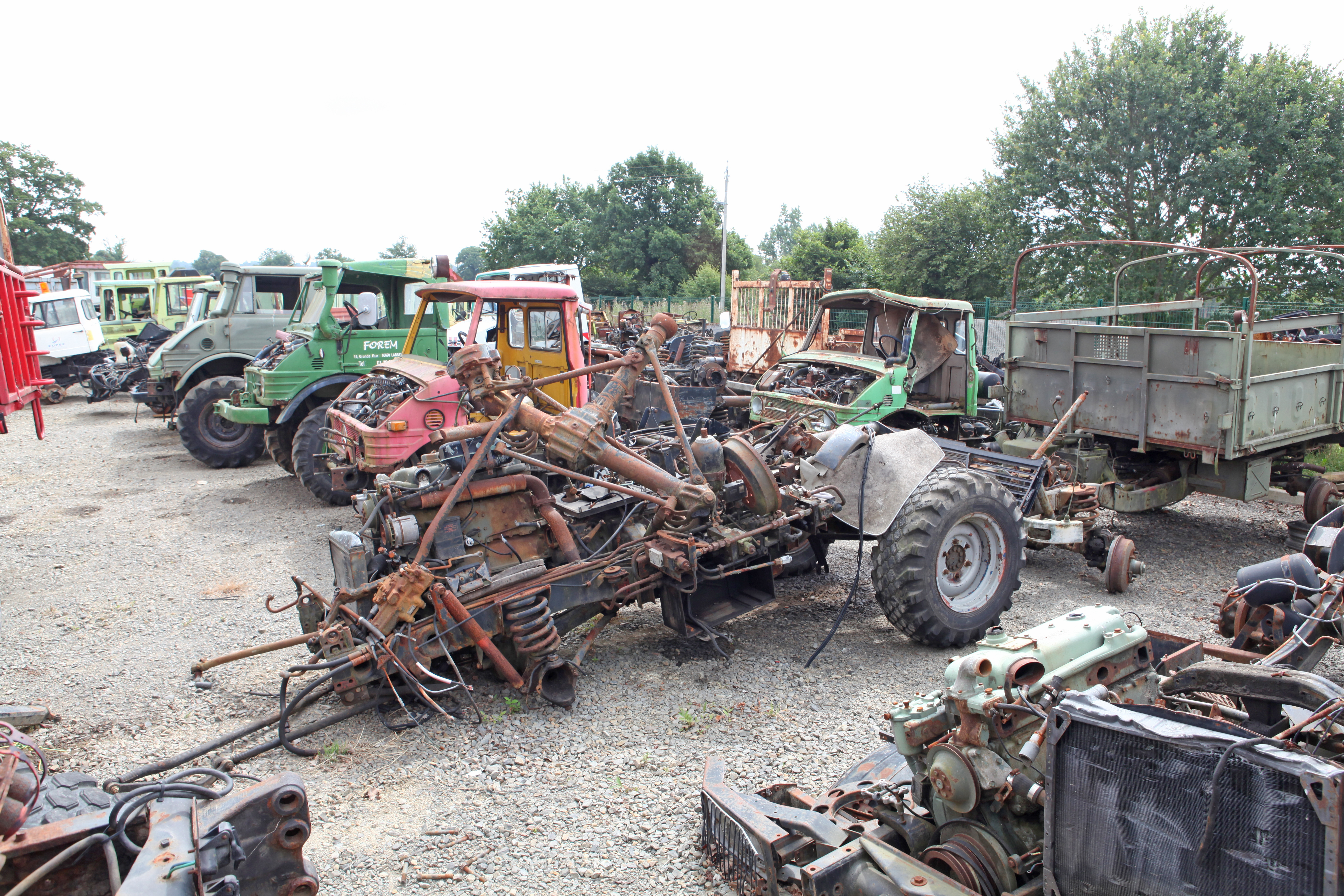 Parts Unimog